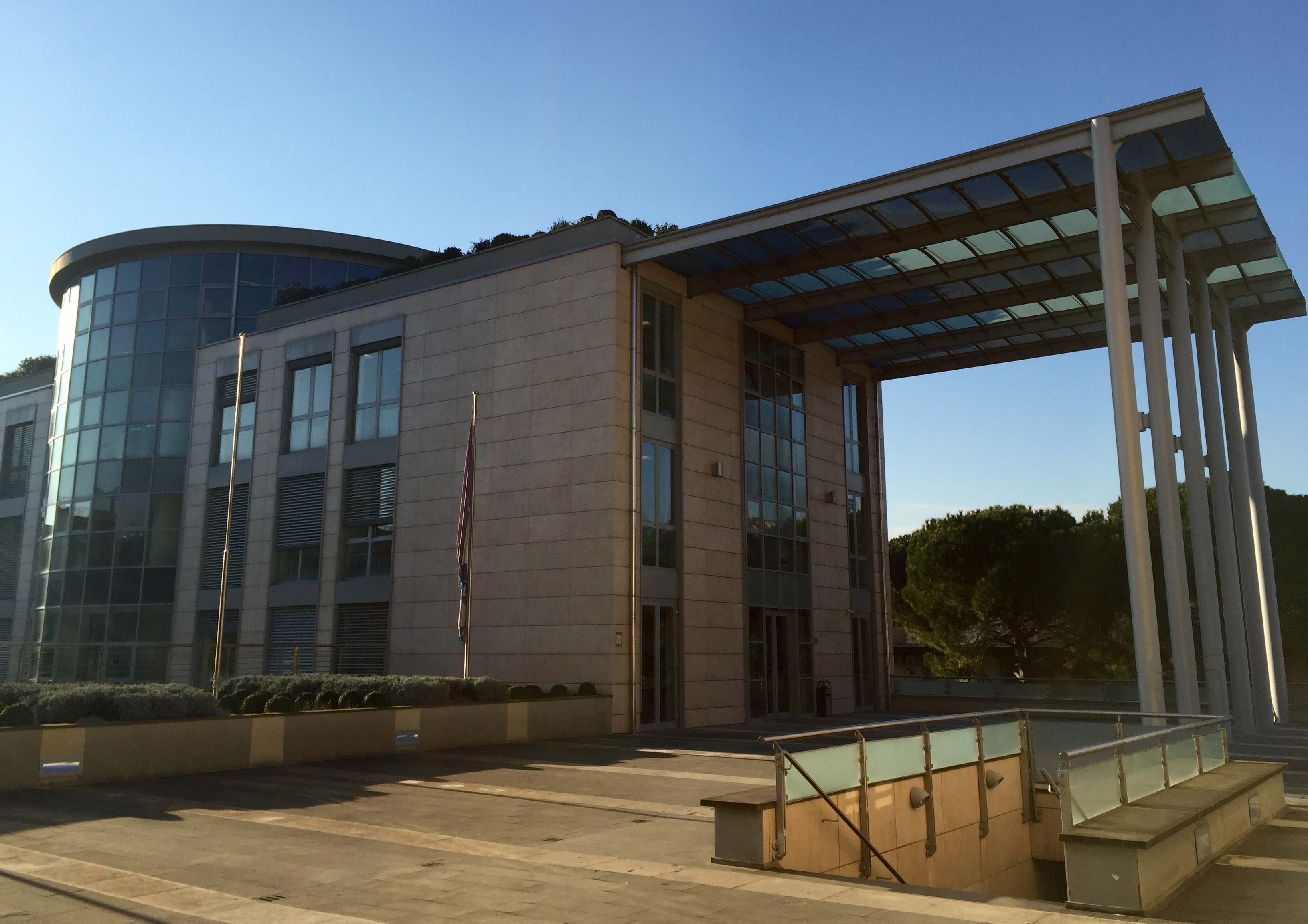 nuovo palazzo comunale